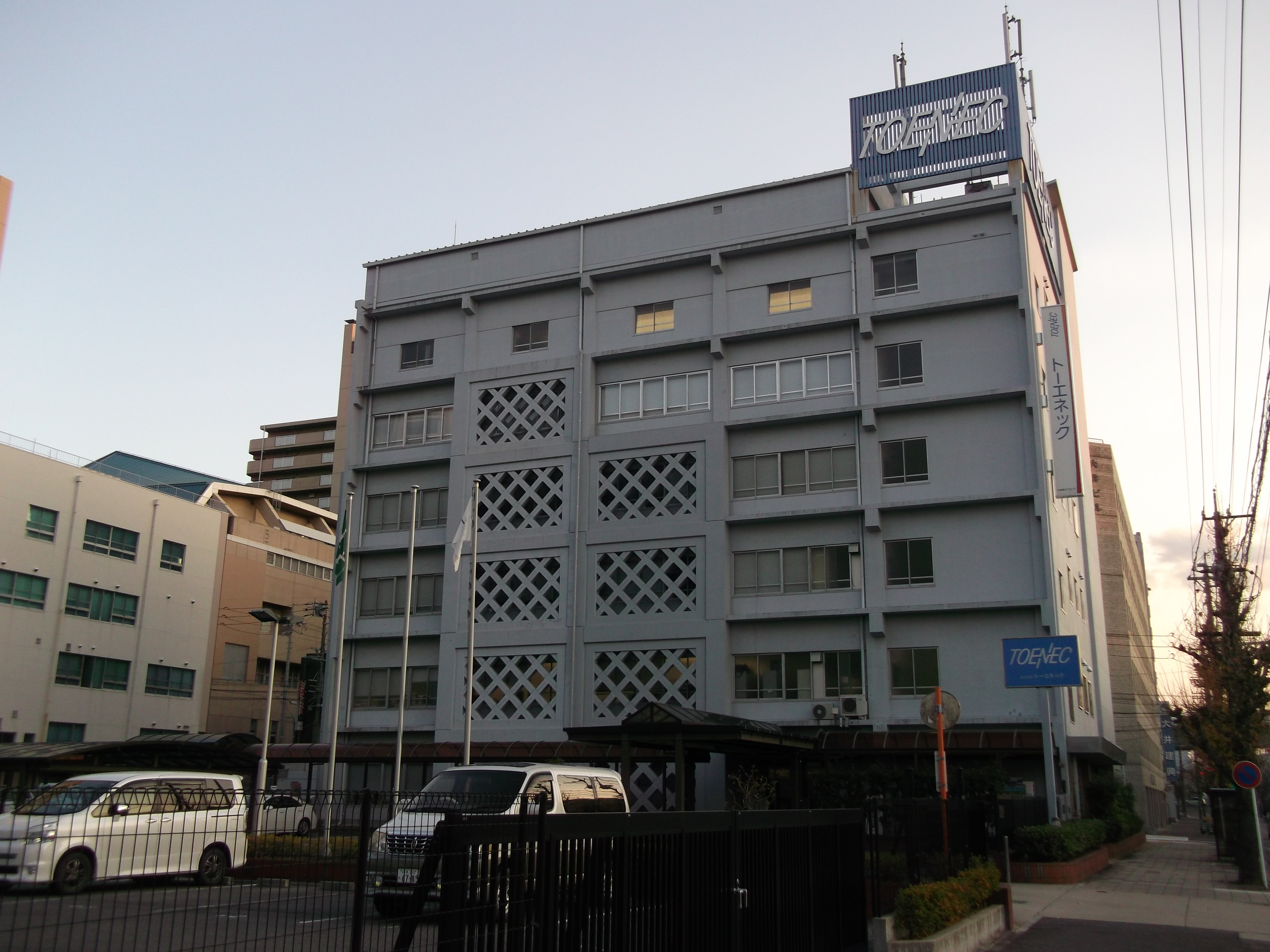 愛知県名古屋市中区栄にあるトーエネック本社を北西角から写す